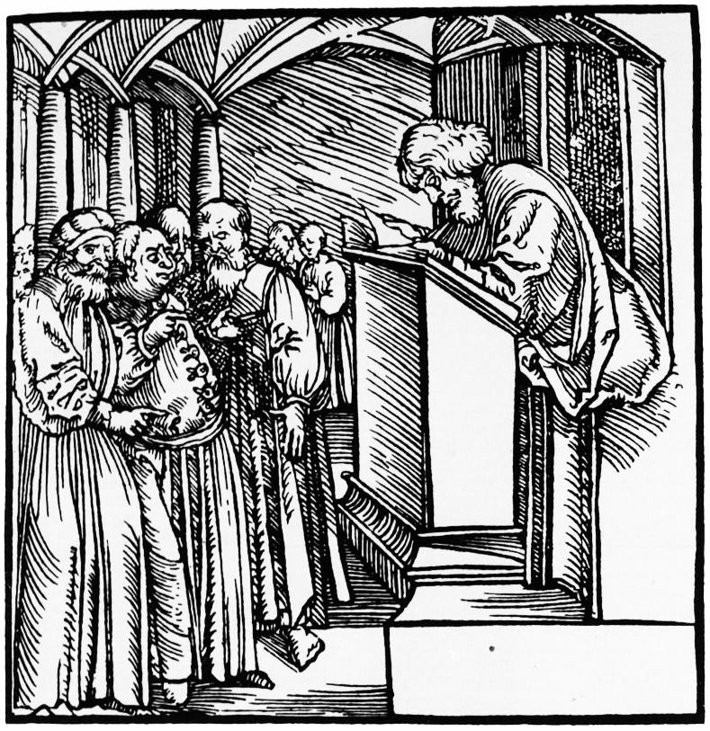 "Дыспут". Книга Исуса Сирахова рекомая Панаретосъ Еклесиастыкусъ или Церъковникъ. Прага, 1517. Тытульны аркуш. 105Х106 мм.